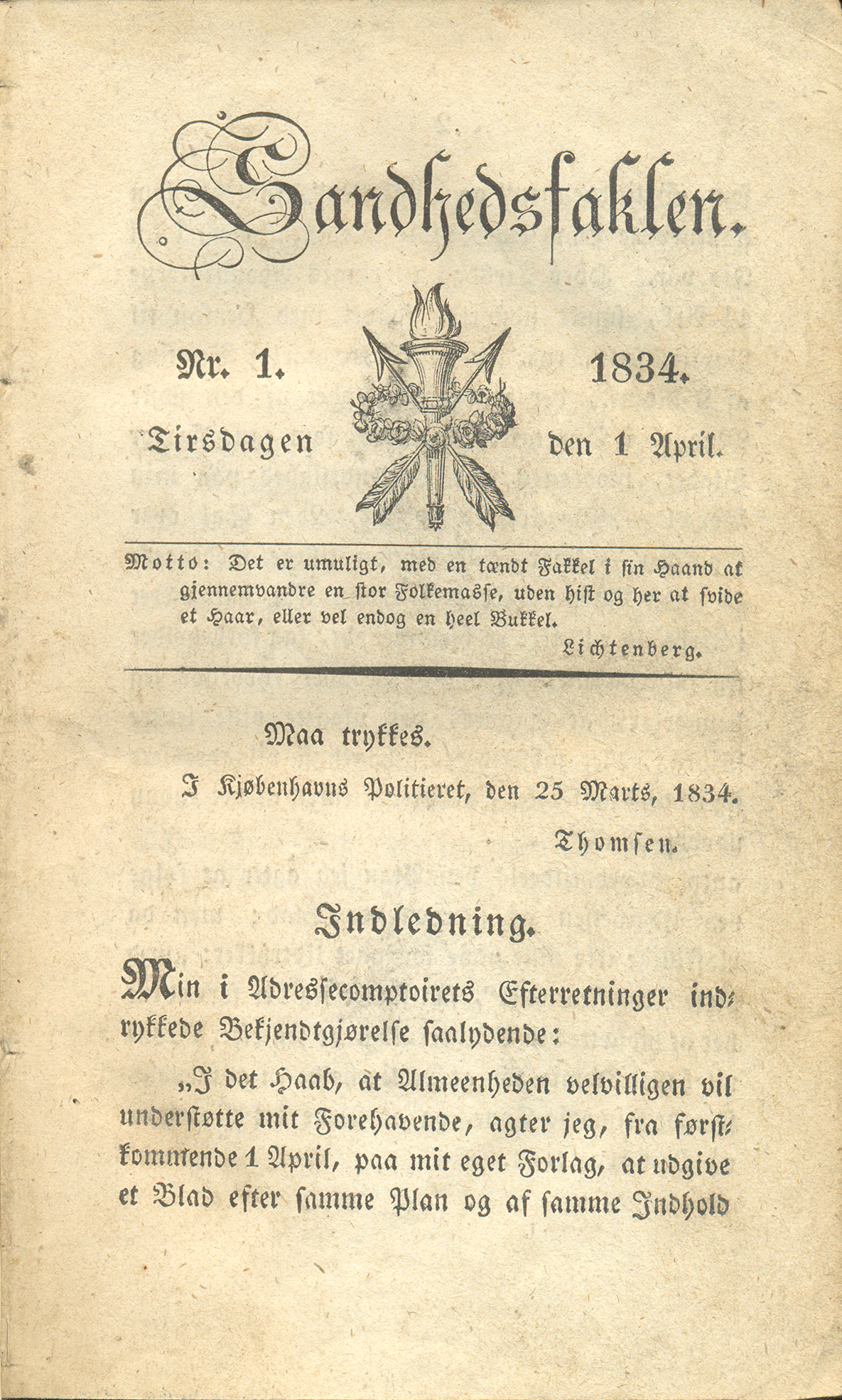 Titelbladet til 1. årgangs 1. nummer af tidsskriftet Sandhedsfaklen fra 1834, udgivet af krigsassessor Hald.